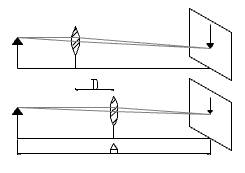 Imagem explicando o Método de Bessel.